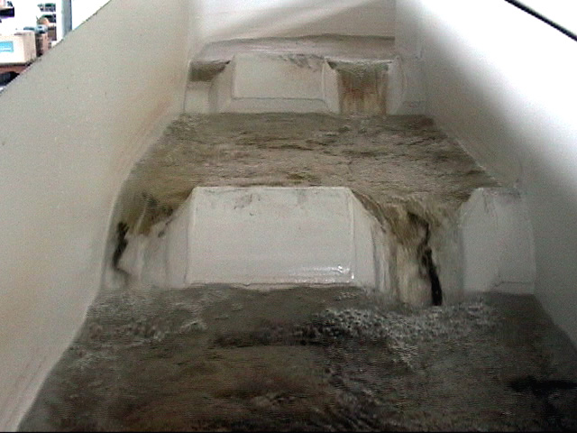 「たて型壁面魚道」のプール壁のスリット部の流れとそこを通過するアマゴ。（岐阜大学・原形魚道実験より。撮影：２００５年１０月。